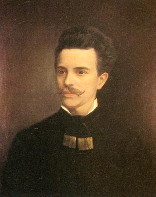 Rakodczay Pál magyar színész, színigazgató, szakíró, színháztörténész. Ismeretlen szerző olajfestménye.